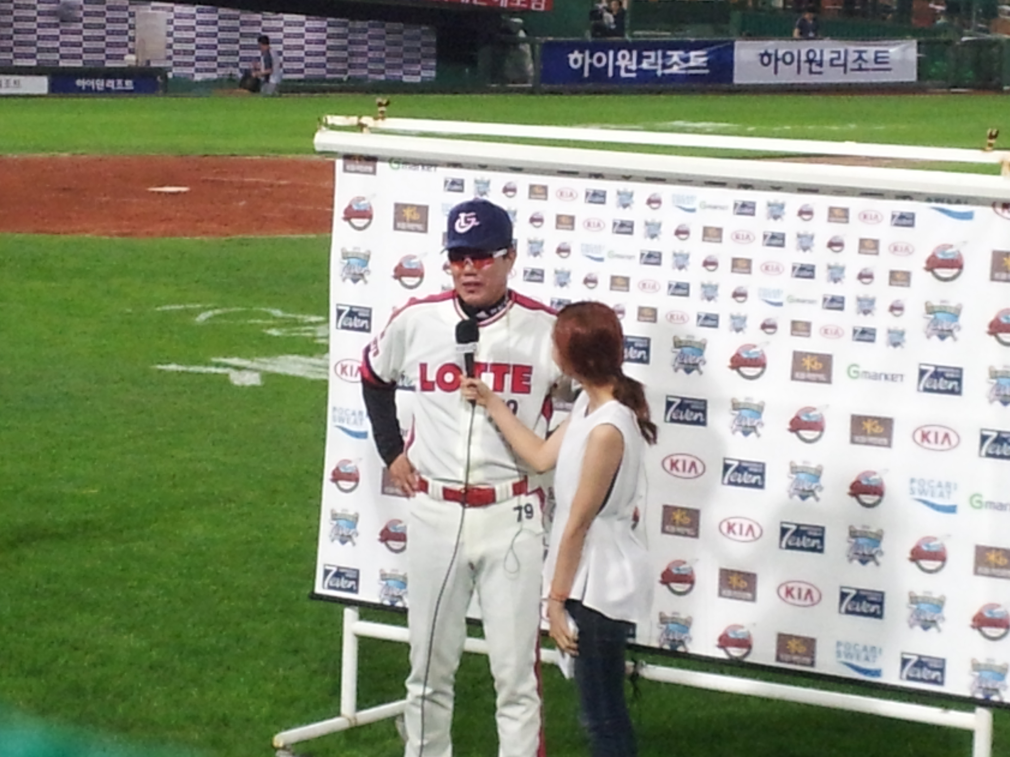 롯데자이언츠 김시진 감독